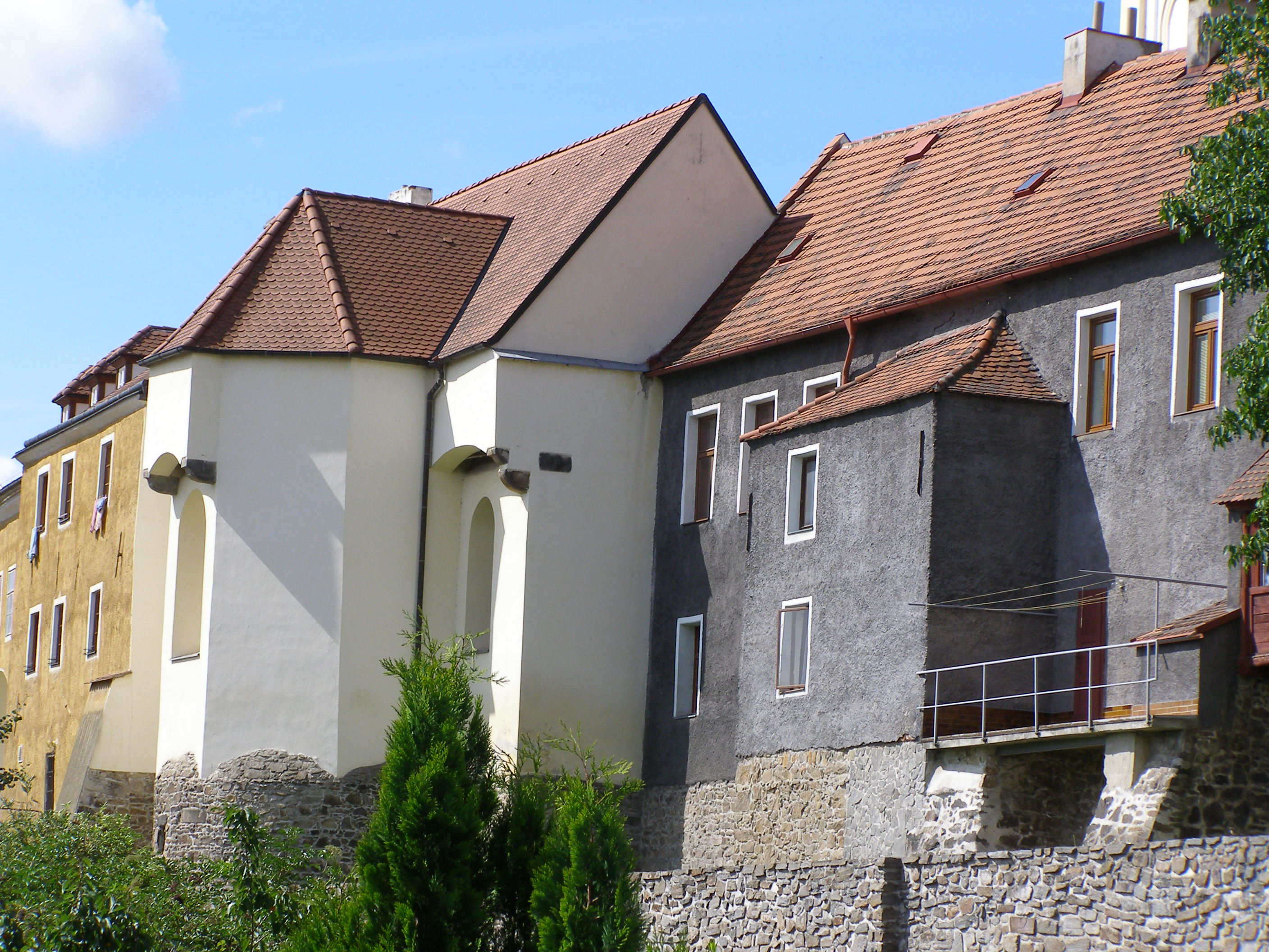 Celkový pohled na Růžencovou kapli z hradebního parkánu